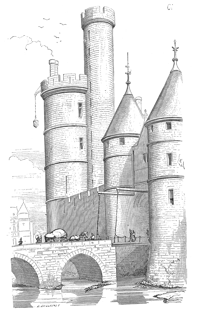 ... La vue perspective de cette tour (fig. 61), prise en dehors de la porte de Nesle, en fait comprendre la valeur comme poste d'observation sur le fleuve. De là des signaux pouvaient être transmis au Louvre , et vice versa, sur tout le front occidental des remparts de la rive gauche et au palais de la Cité. En amont de Paris, deux autres tours à peu près semblables à celle-ci barraient la rivière: l'une, dite tour Barbeau, formait tête du rempart sur la rive droite; l'autre, dite la Tournelle, avait la même destination sur la rive gauche. Ces deux ouvrages, qui se trouvaient au droit du milieu de l'île Saint-Louis, se reliaient avec deux autres tours élevées sur les berges de cette île, coupée alors par un fossé que remplissait la Seine ...